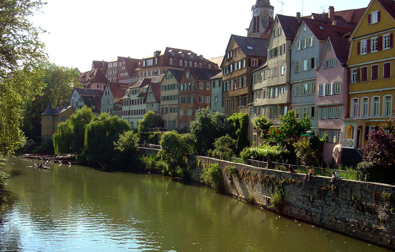 Neckarfront in Tübingen